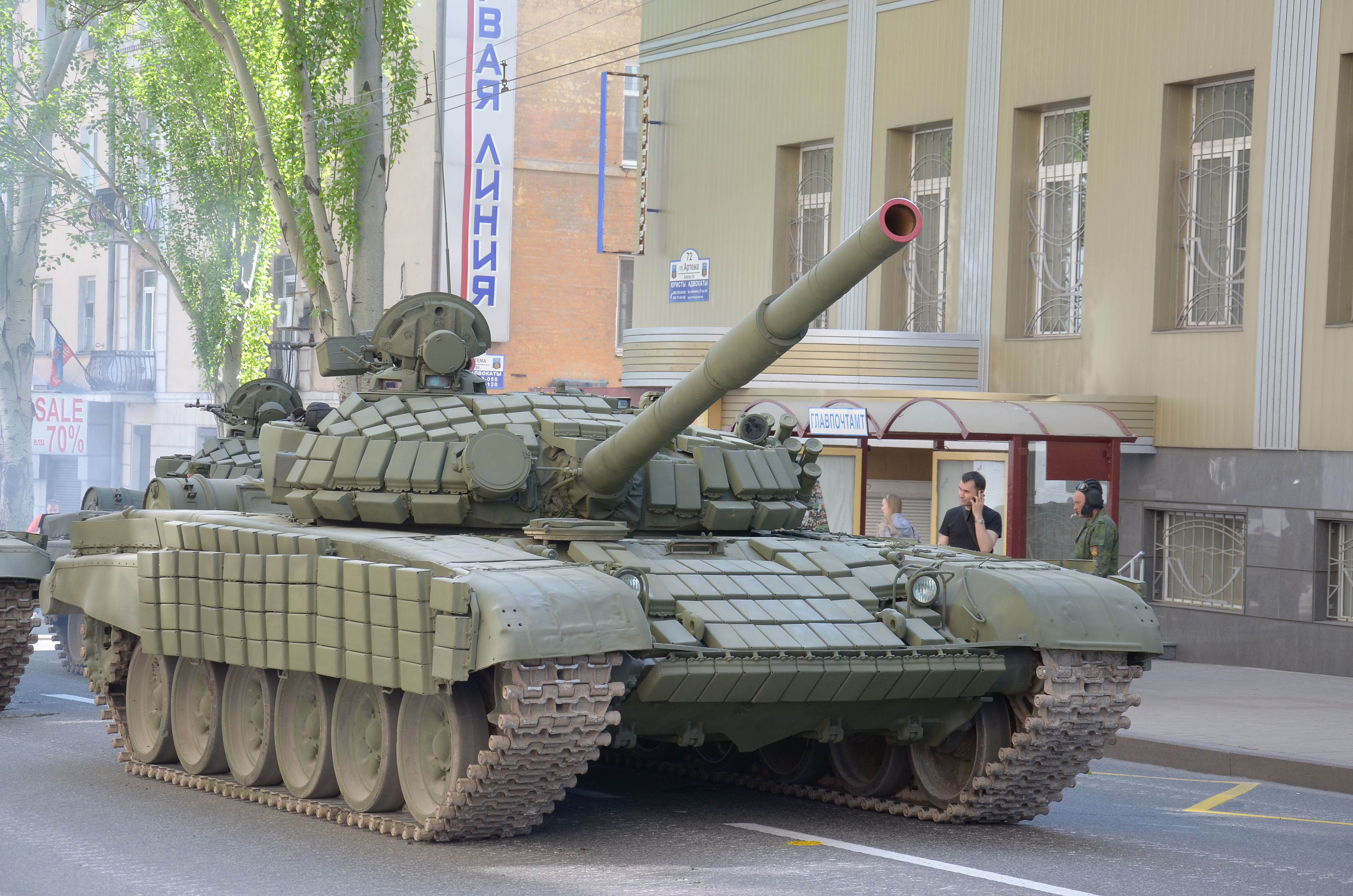 День Победы в Донецке